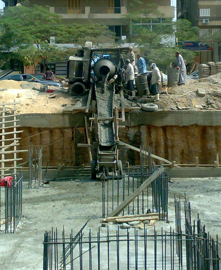 خلط ميكانيكي لخرسانة مبني في المنطقة السادسة - مدينة نصر - القاهرة.